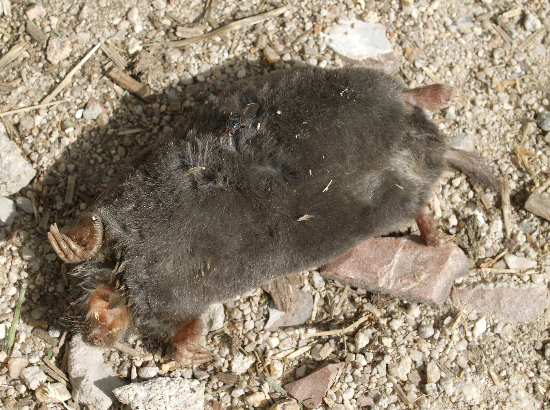 Talpa occidentalis cadáver. Losar de la Vera, Cáceres, España.